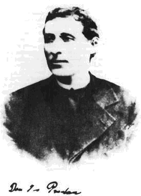 Ivo Prodan